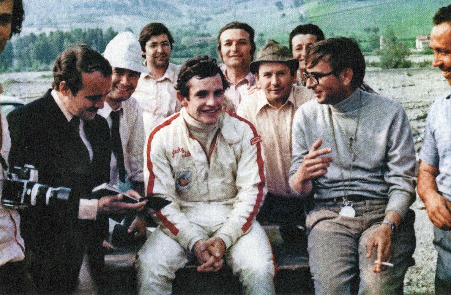 Il pilota automobilistico belga Jacky Ickx (al centro), e l'ingegnere e costruttore italiano Gian Paolo Dallara (a destra), a colloquio sul circuito di Varano de' Melegari.